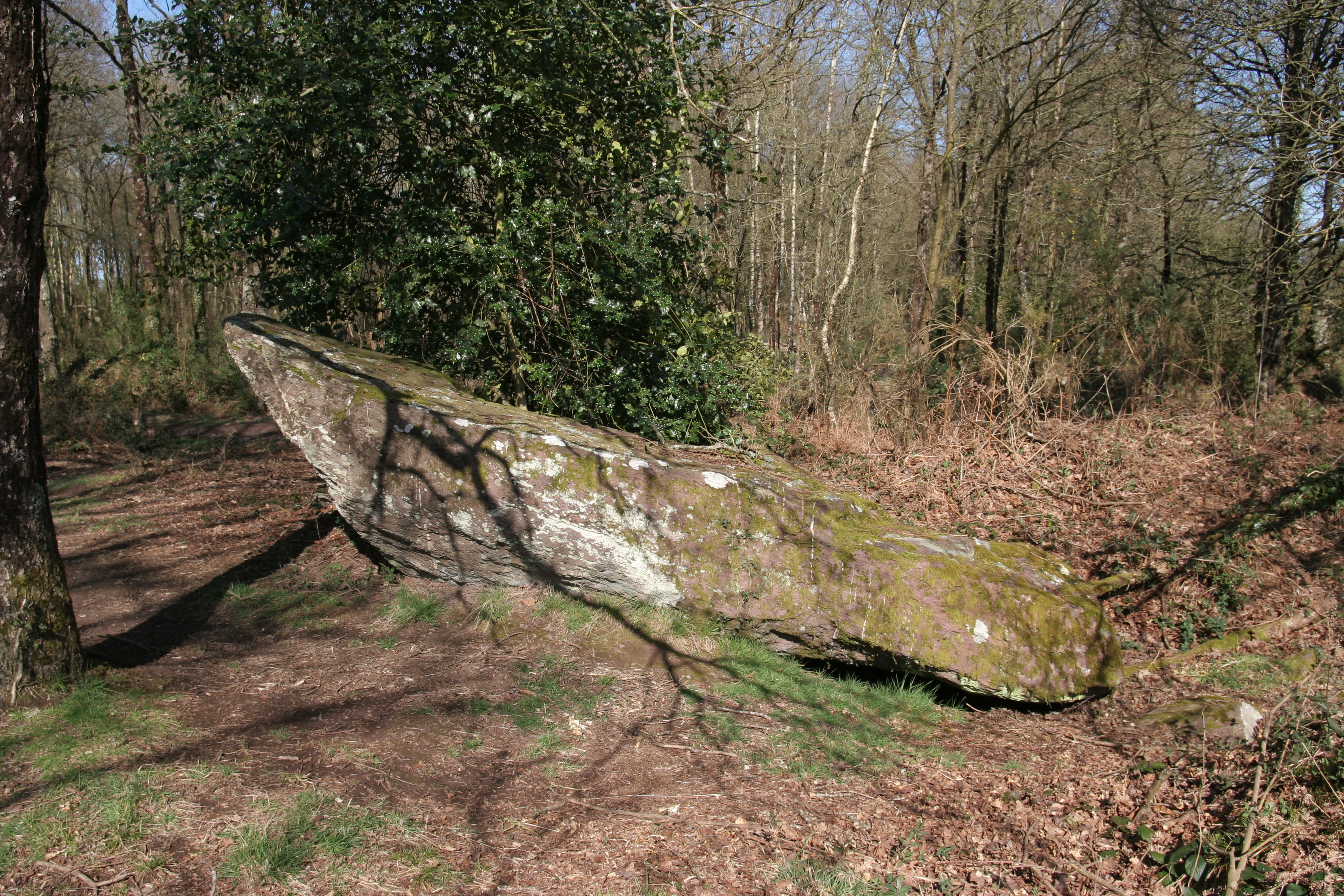 Menhir couché de La Roche-qui-Chôme, Laillé (Ille-et-Vilaine, Bretagne, France).